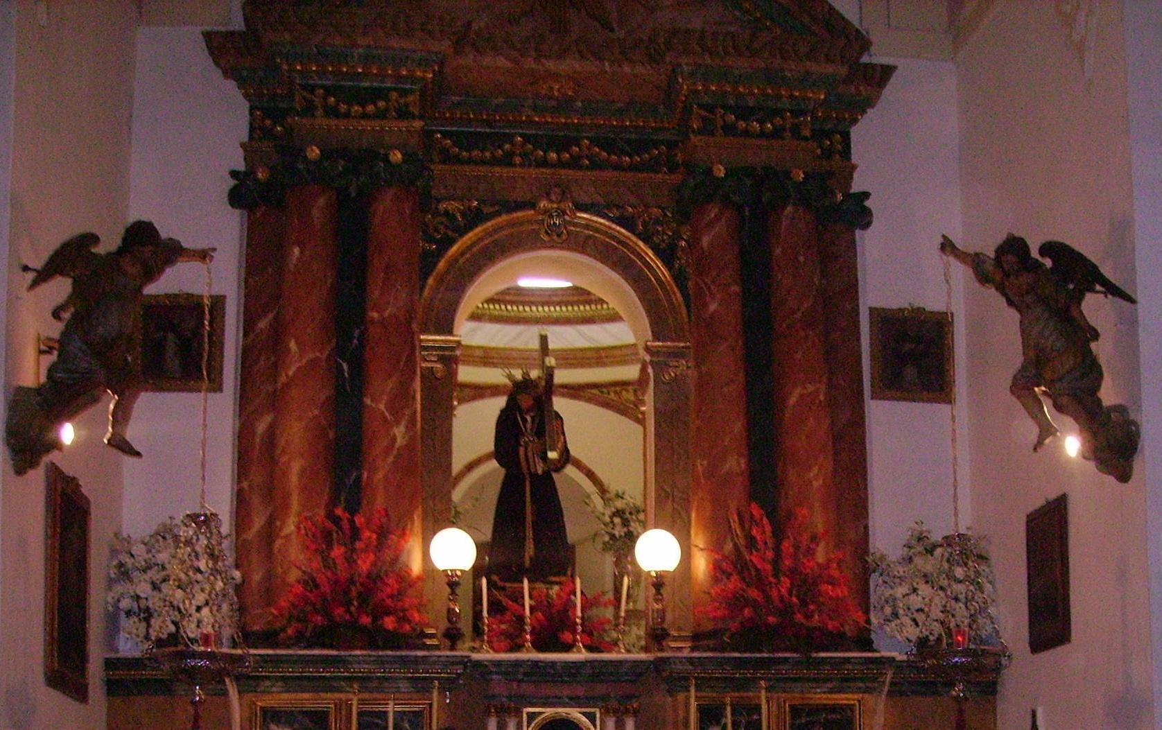 Parte del retablo de la Ermita de El Calvario en la que se puede observar la imagen de Ntro. Padre Jesús de El Calvario, en Montalbán de Córdoba (España)